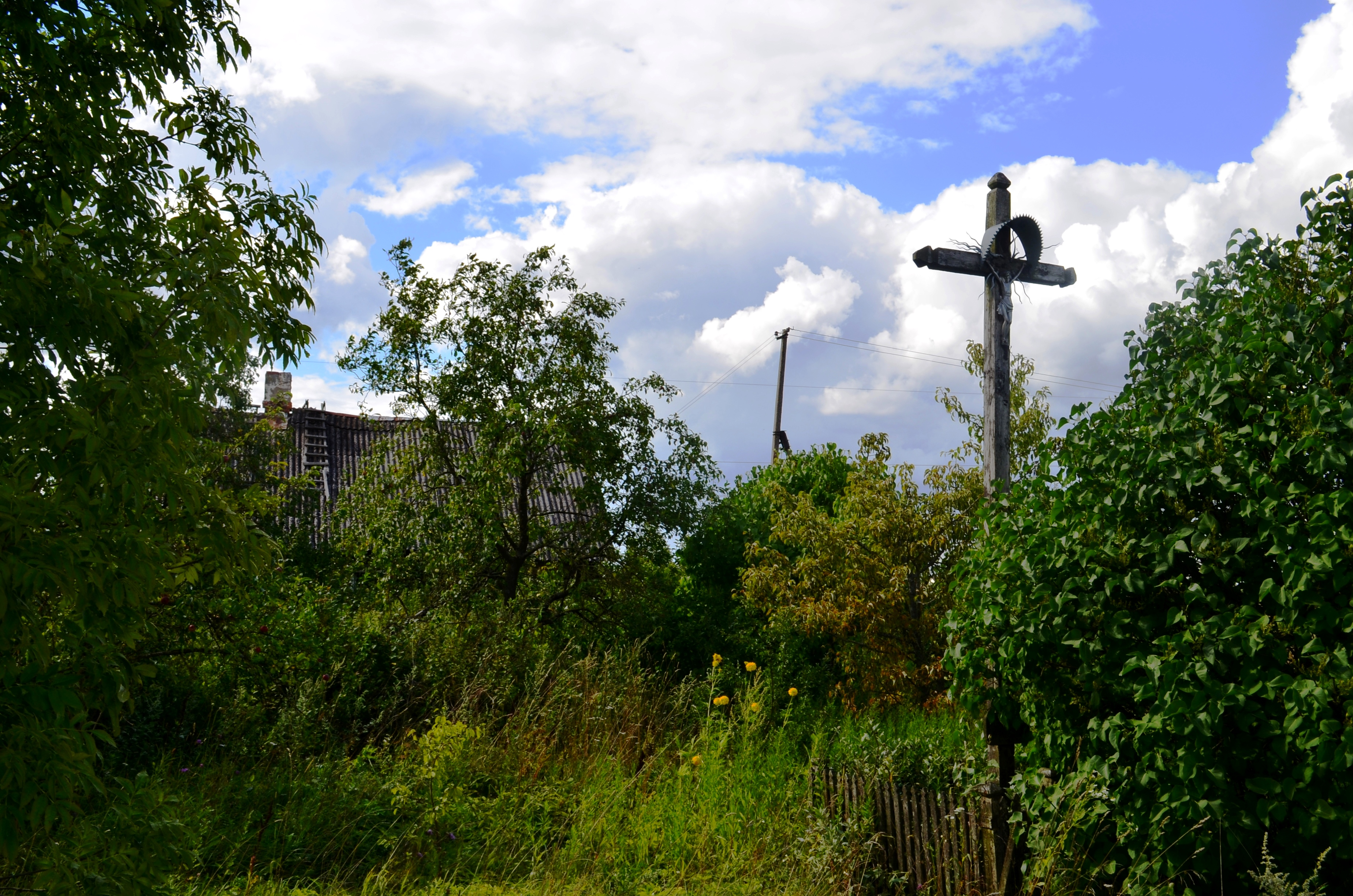 Kryžius prie sodybos, Ledai, Kėdainių raj.